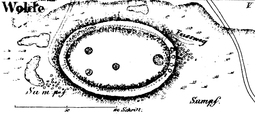 Valjala maalinn